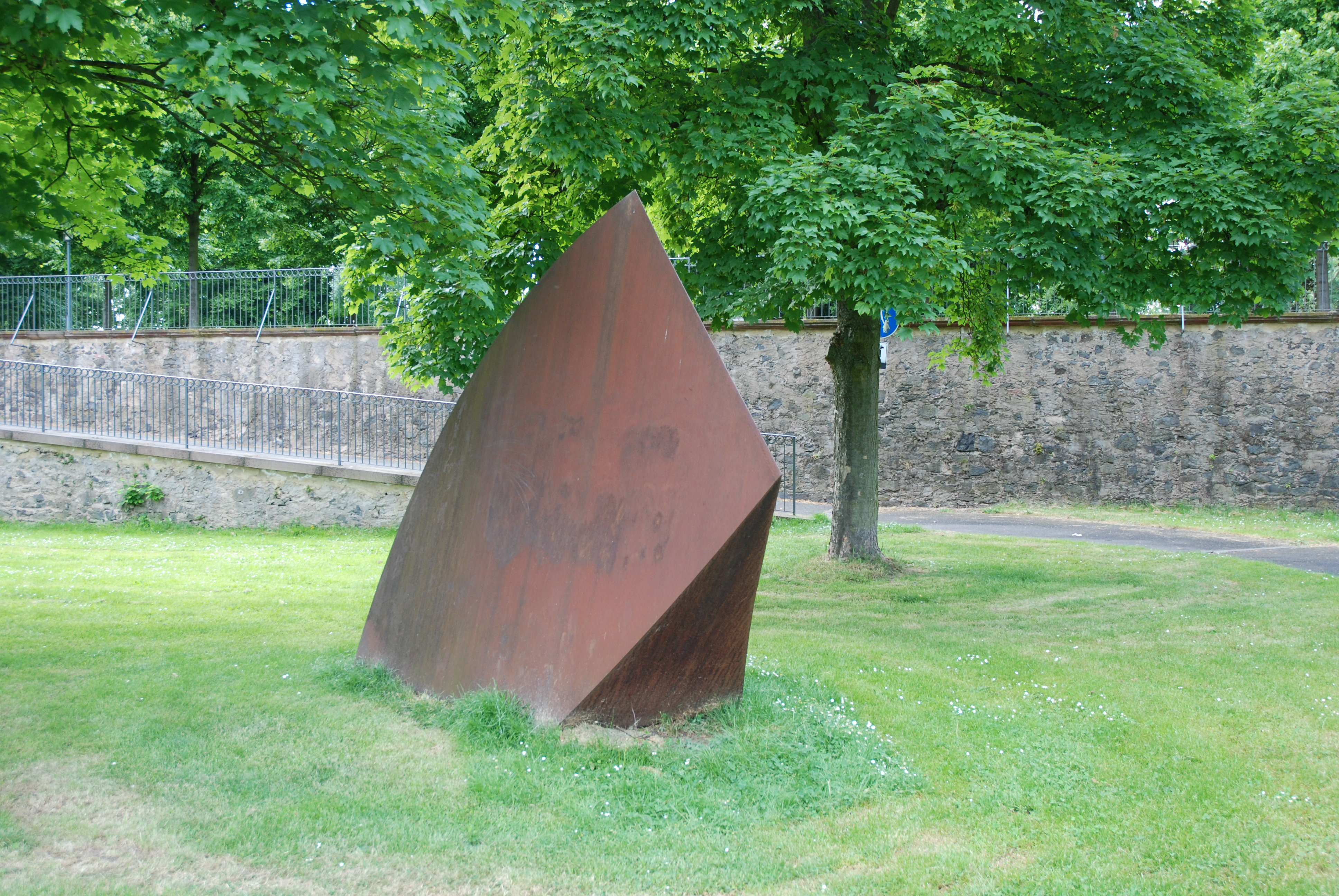 Michael Croissant: Kopf (1986). Cortenstahl geschweißt, 290x316x210 cm. Stadtbildhauerwettbewerb 1986. Schloss Philippsruhe, Hanau